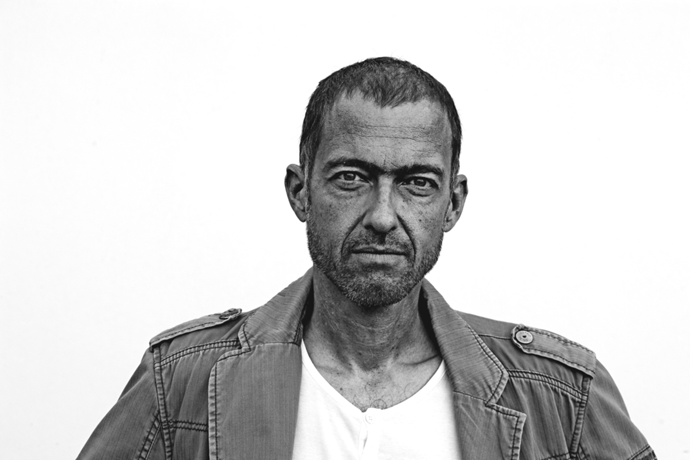 Foto: Werner Linsberger